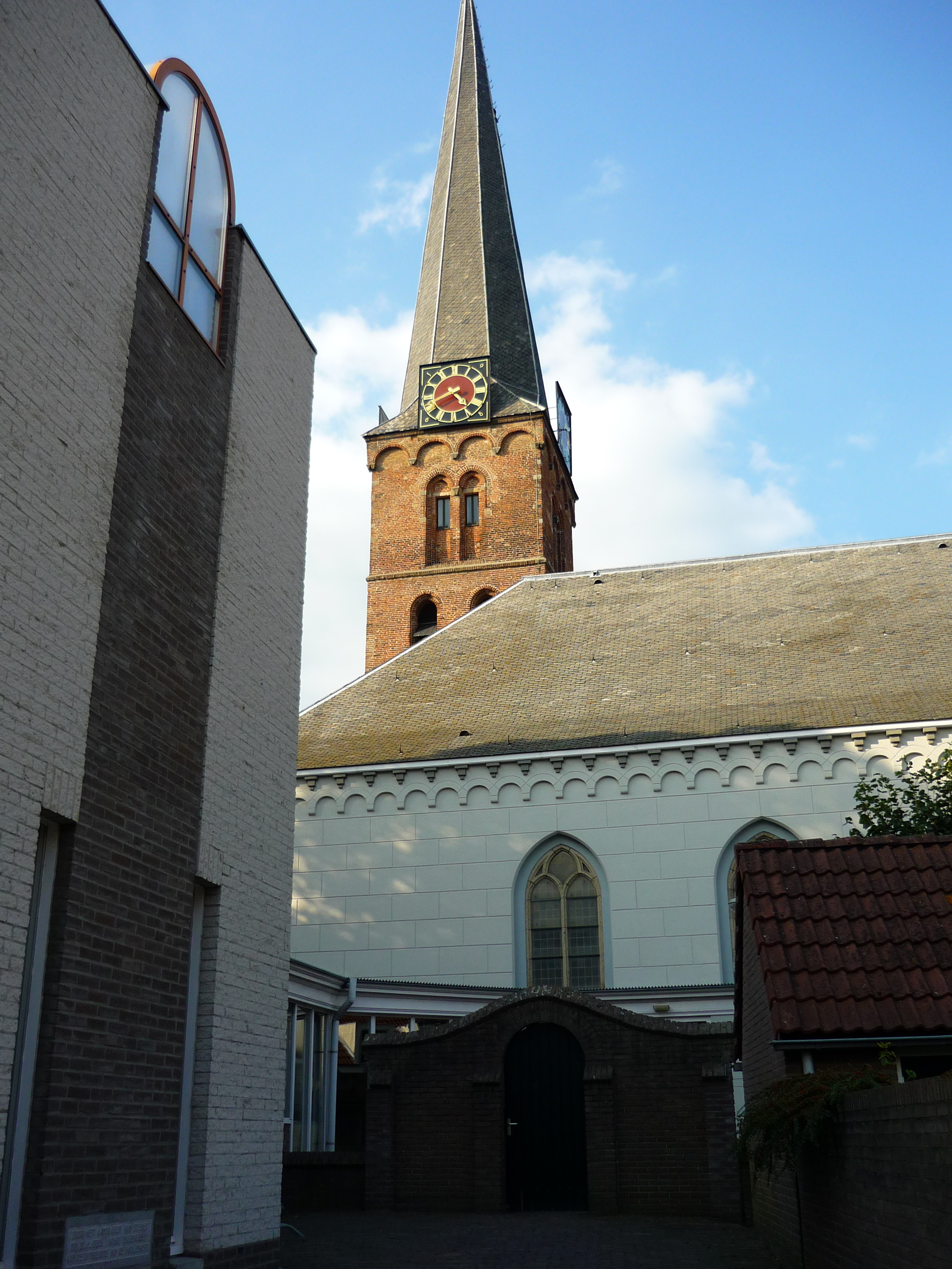 Achterkant van de Pauluskerk.